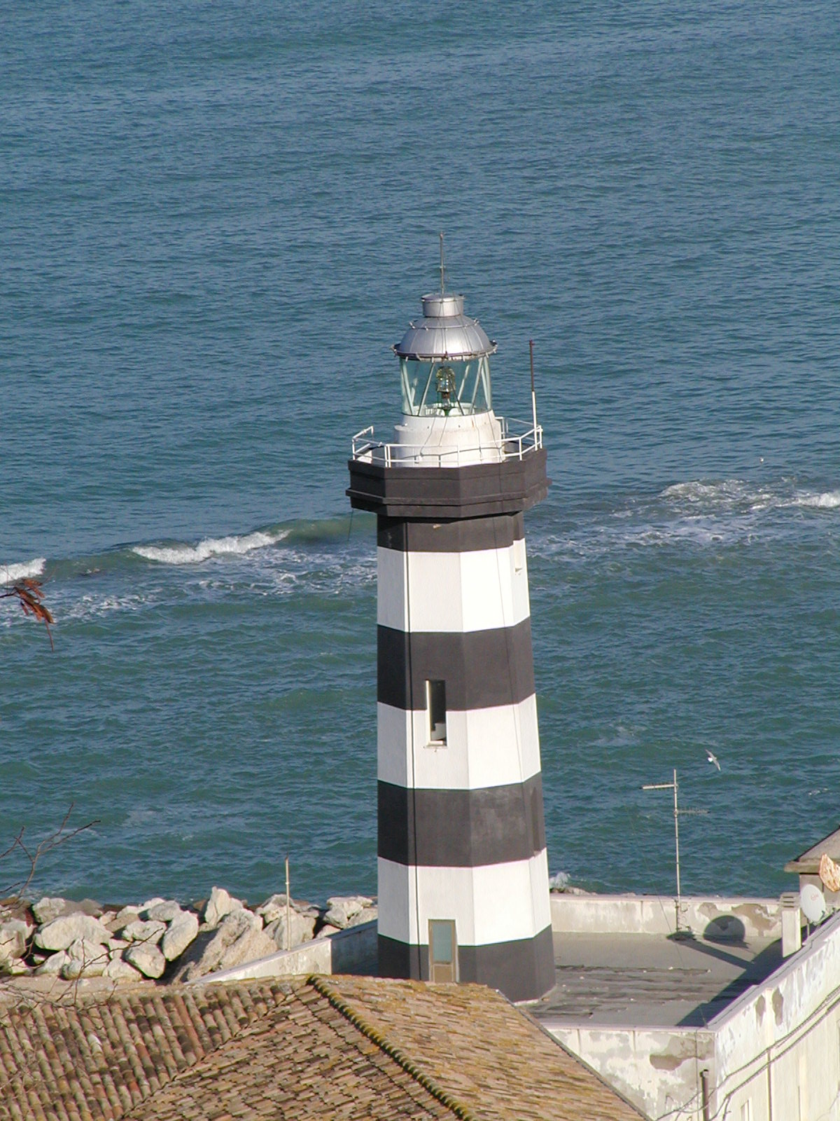 Die kleine Leuchtturm